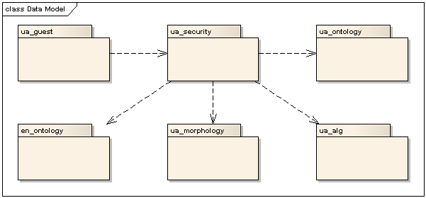 Діаграма основних логічних блоків-елементів СУБД